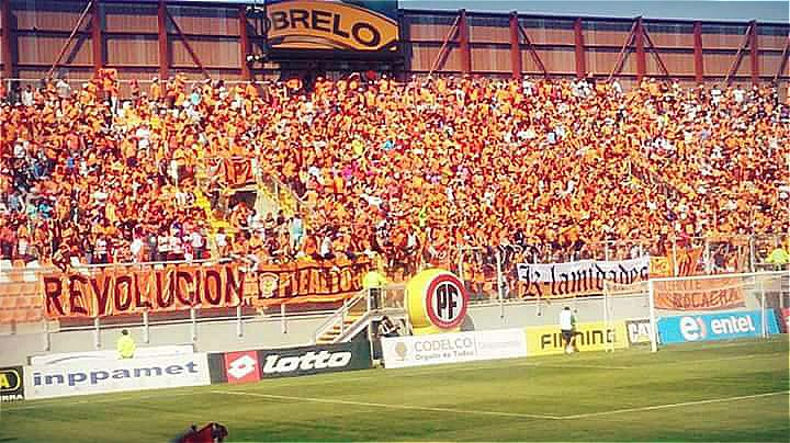 Huracán Naranja